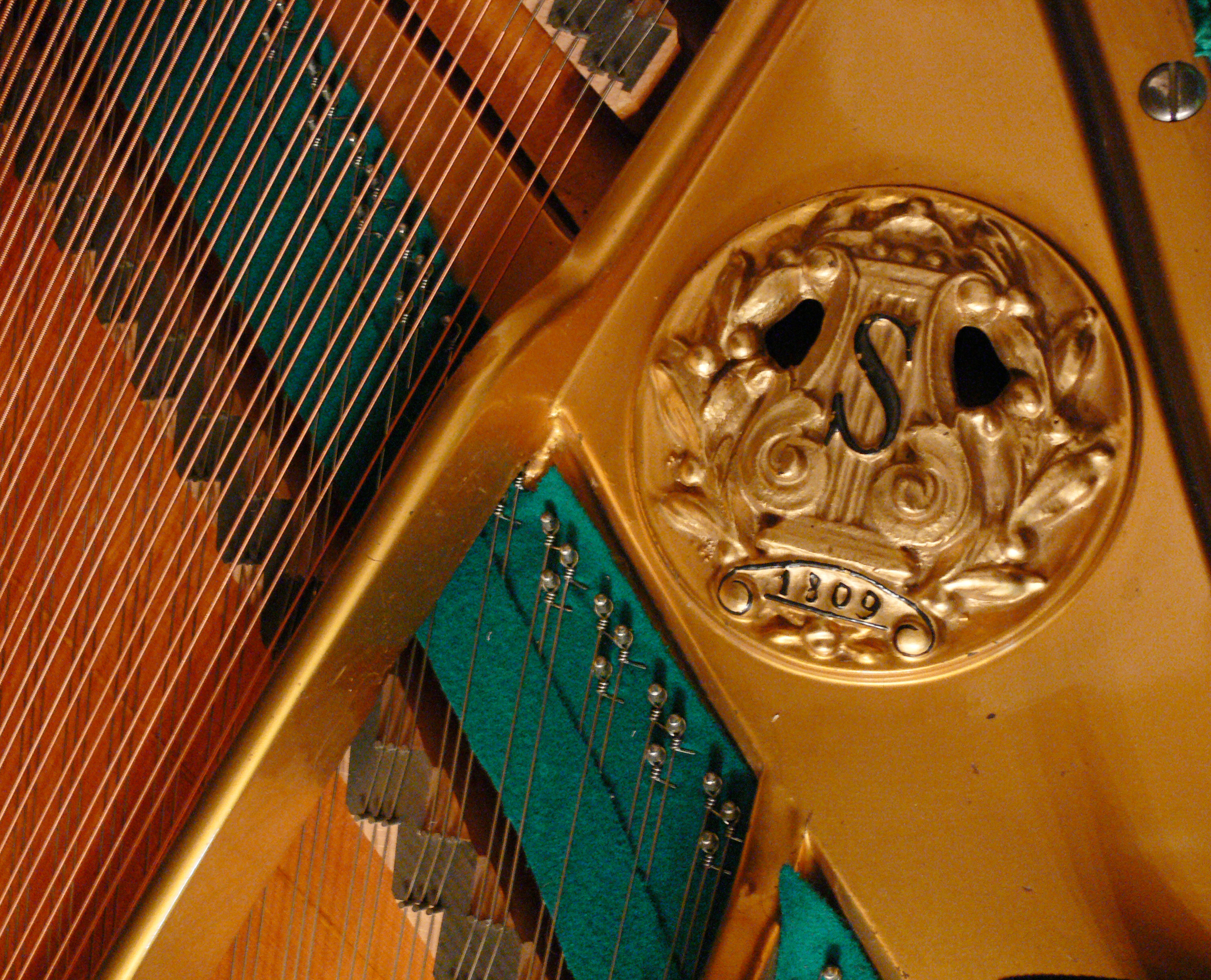 Schiedmayer & Söhne, Stuttgart, Grand Piano, Model 20 (1926-1930), Schiedmayer Logo